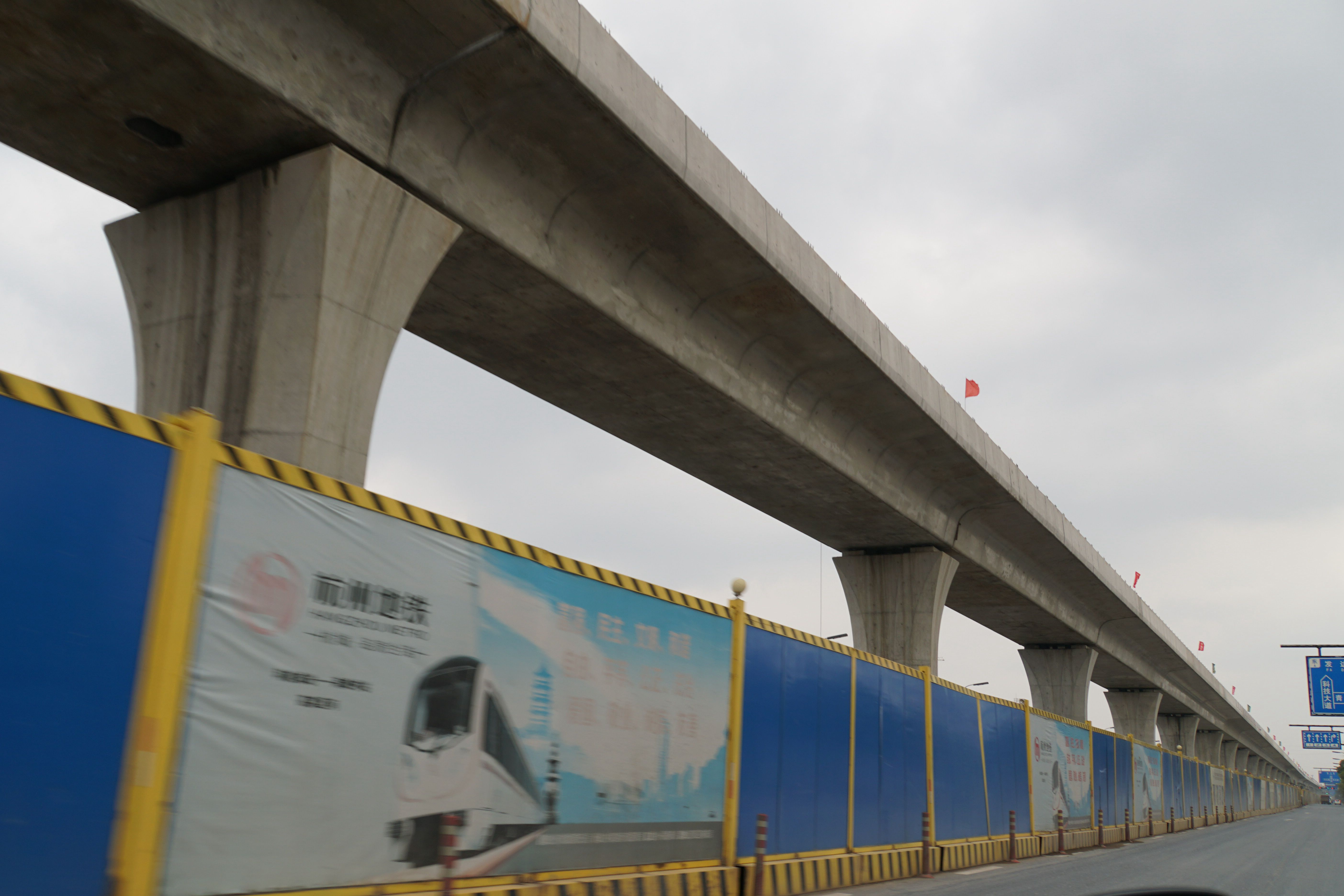 杭州城际铁路临安线高架区段，南峰村到科技城区间